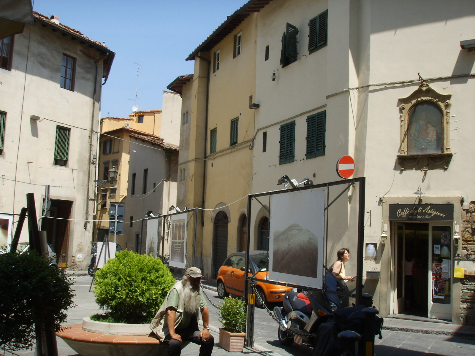 Passera Square, Piazza della Passera in Florence, Italy